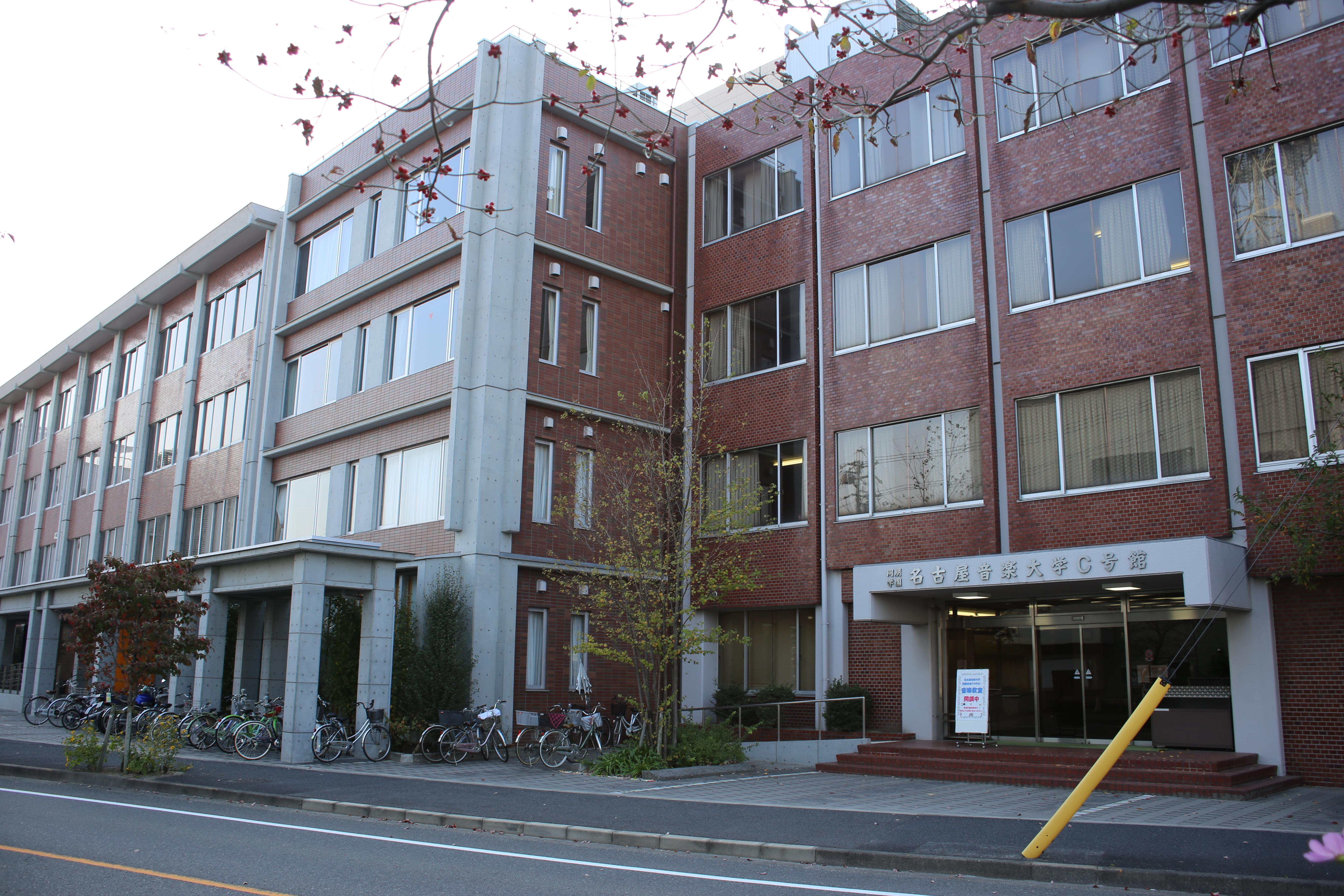 名古屋市中村区稲葉地町の名古屋音楽大学C号館を東側公道北側より撮影